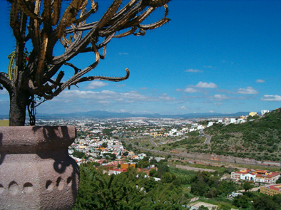 zicht op het noordelijke deel van Querétaro